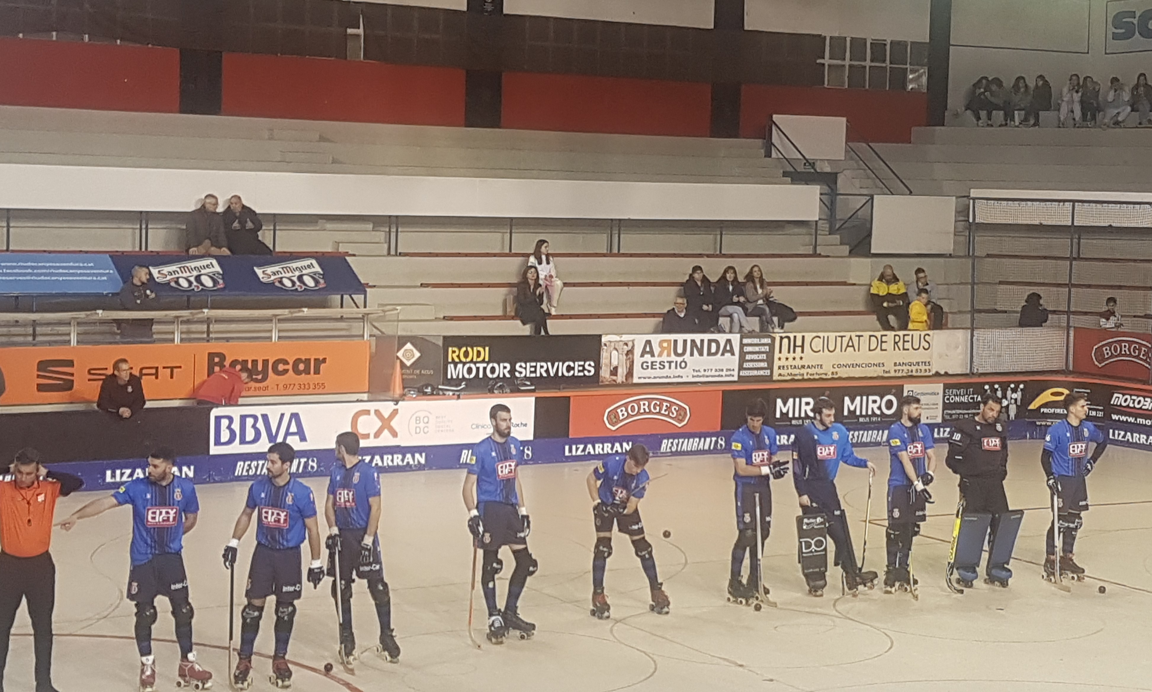 Plantilla Girona Hoquei Club